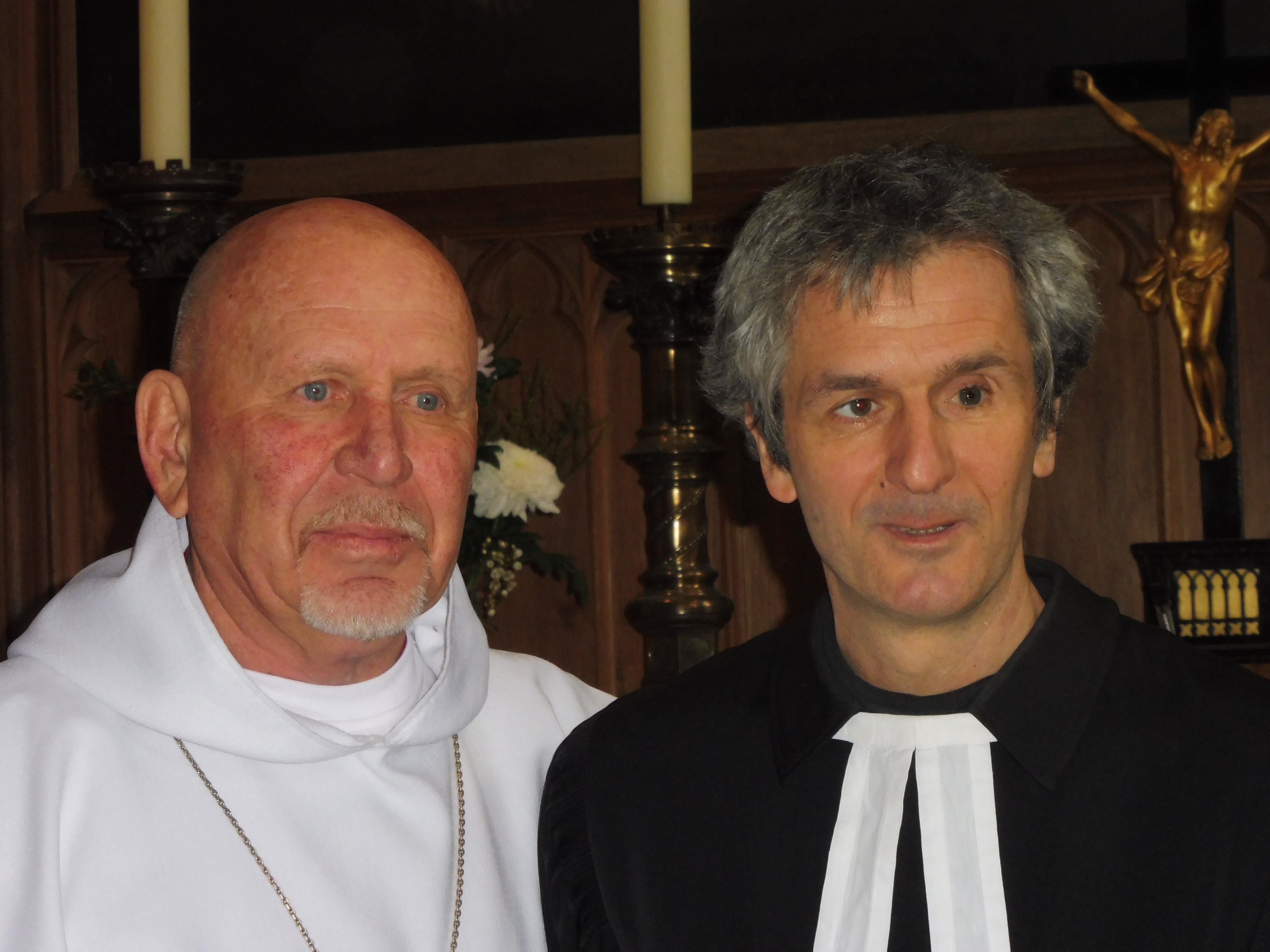 Erzbischof Jurij Novgorodov und Pastor Stephan Poppe in der Plauer Marienkirche